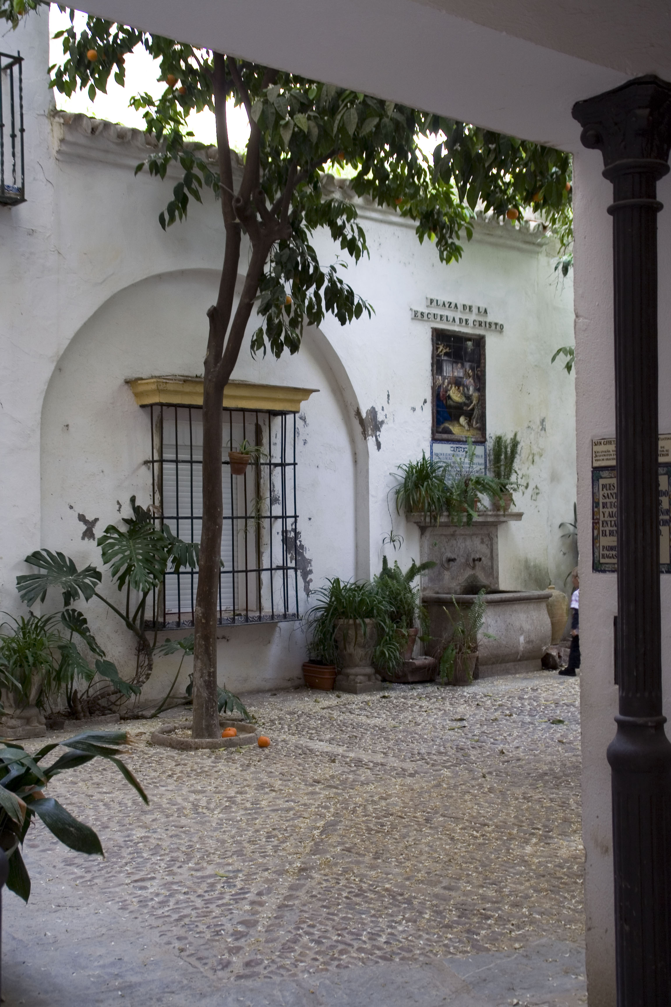 Plaza de la Escuela de Cristo. Barrio de Santa Cruz. Sevilla.